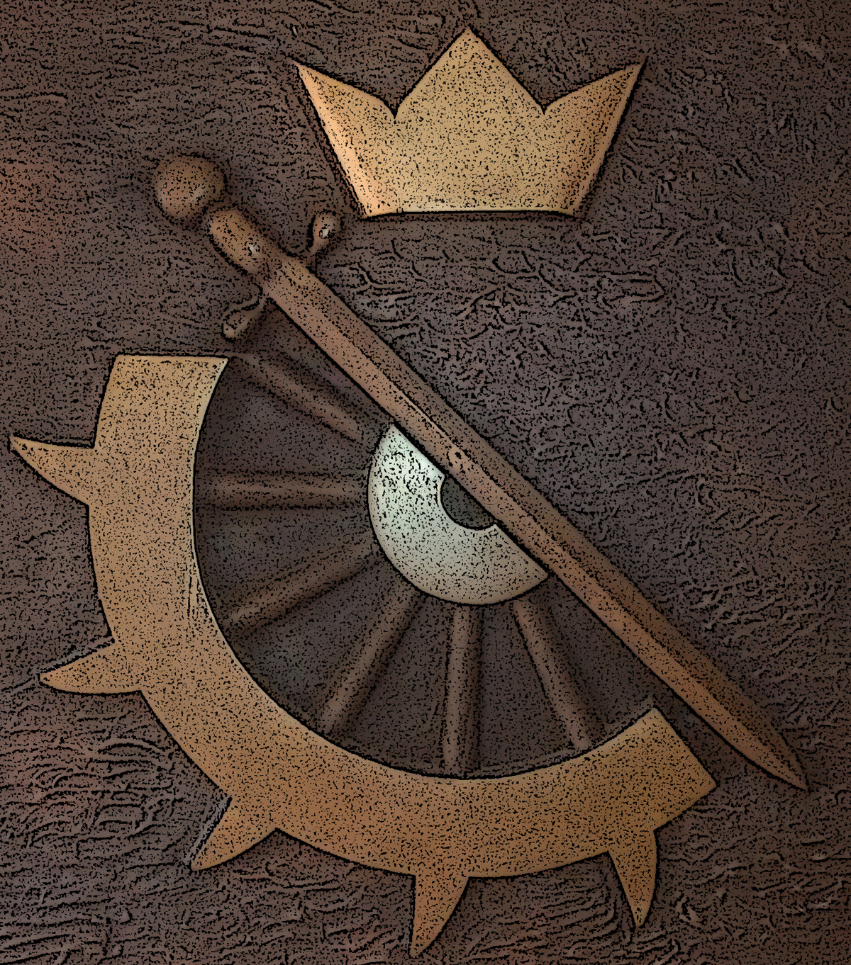 Bronzetafel in Sankt Gertrauden Krankenhaus Berlin Wilmersdorf, mit der Darstellung des Ordenswappens der Katharinenschwestern.